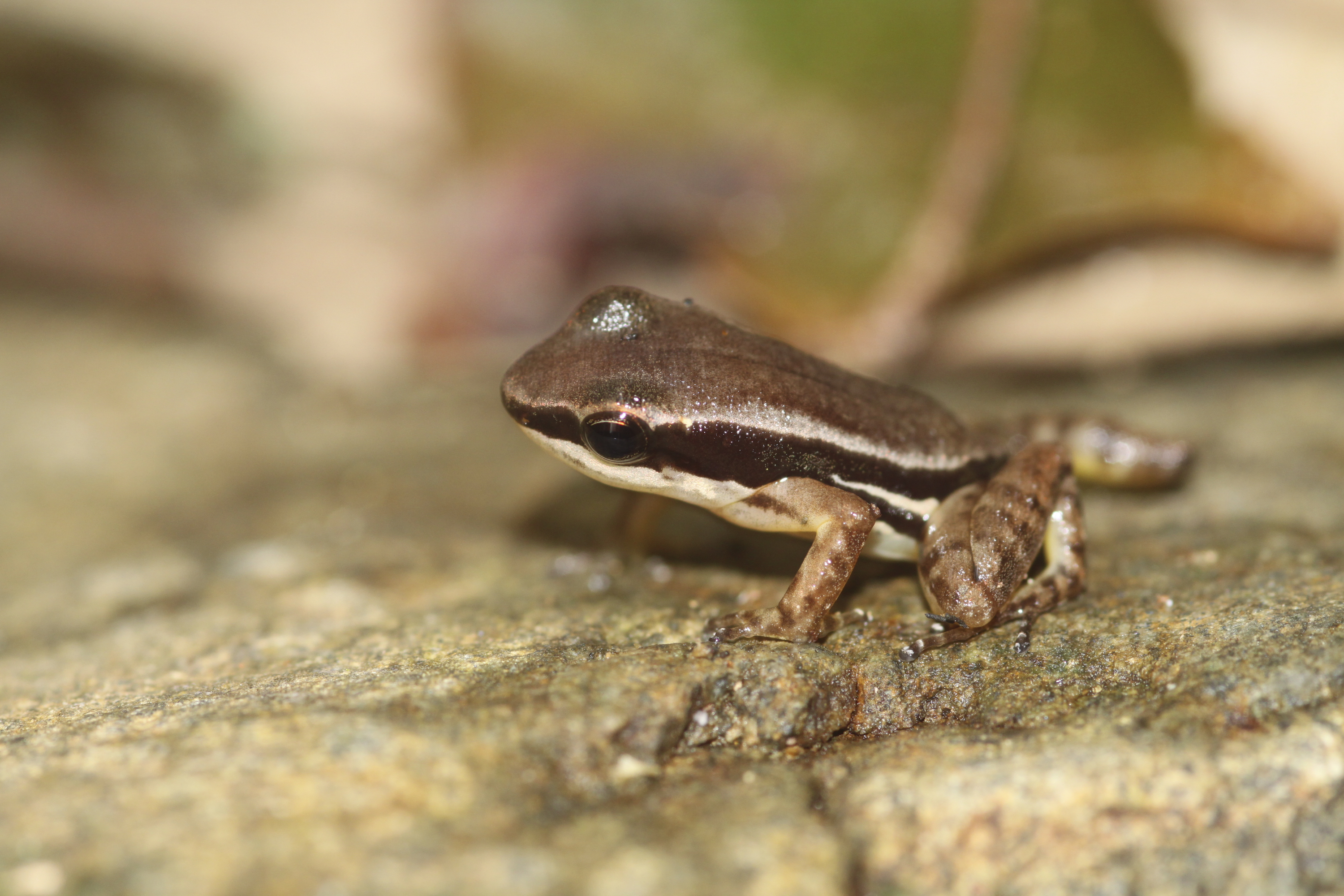 Colostethus pratti, Panama